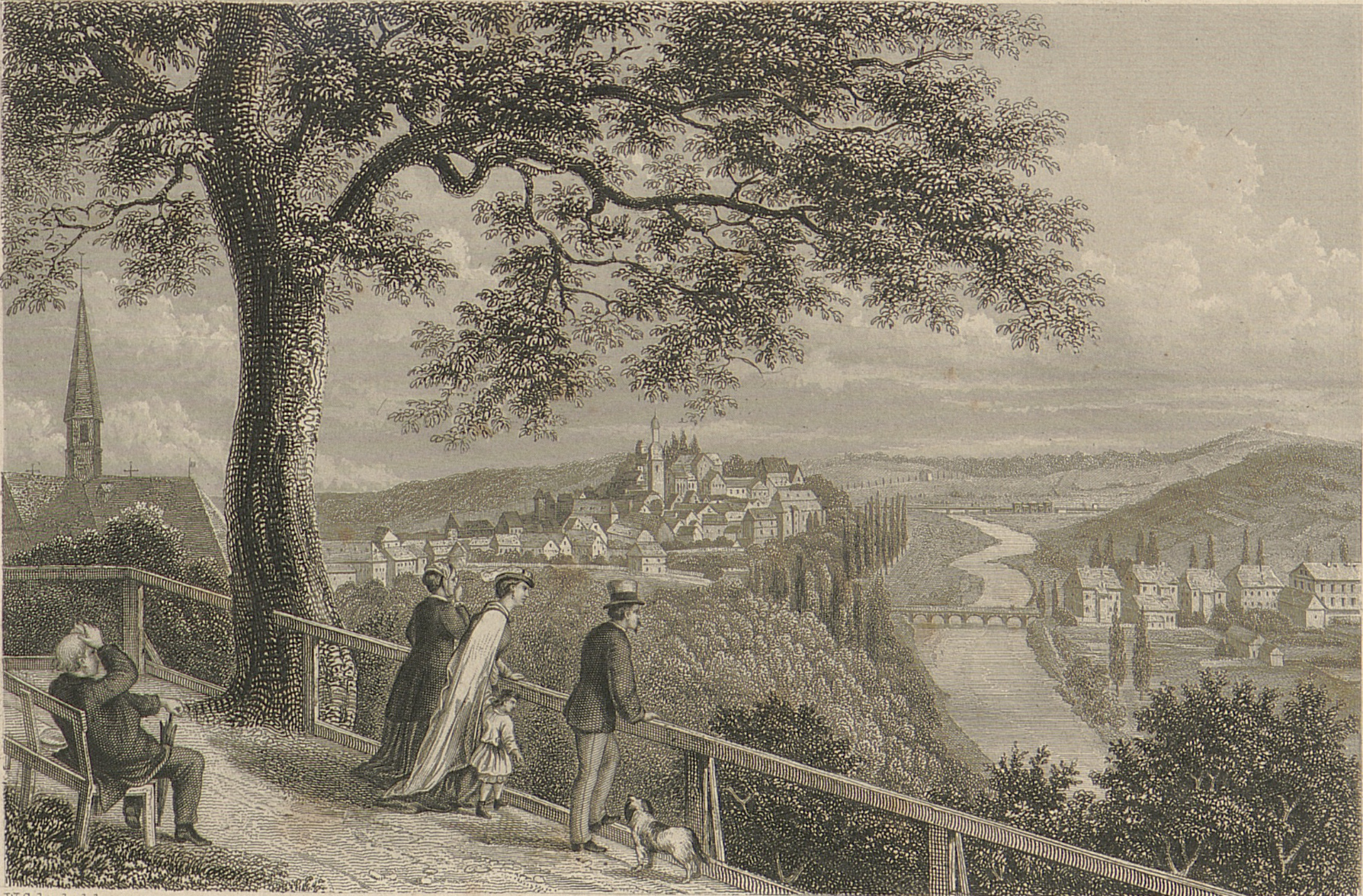 Arnsberg an der Ruhr